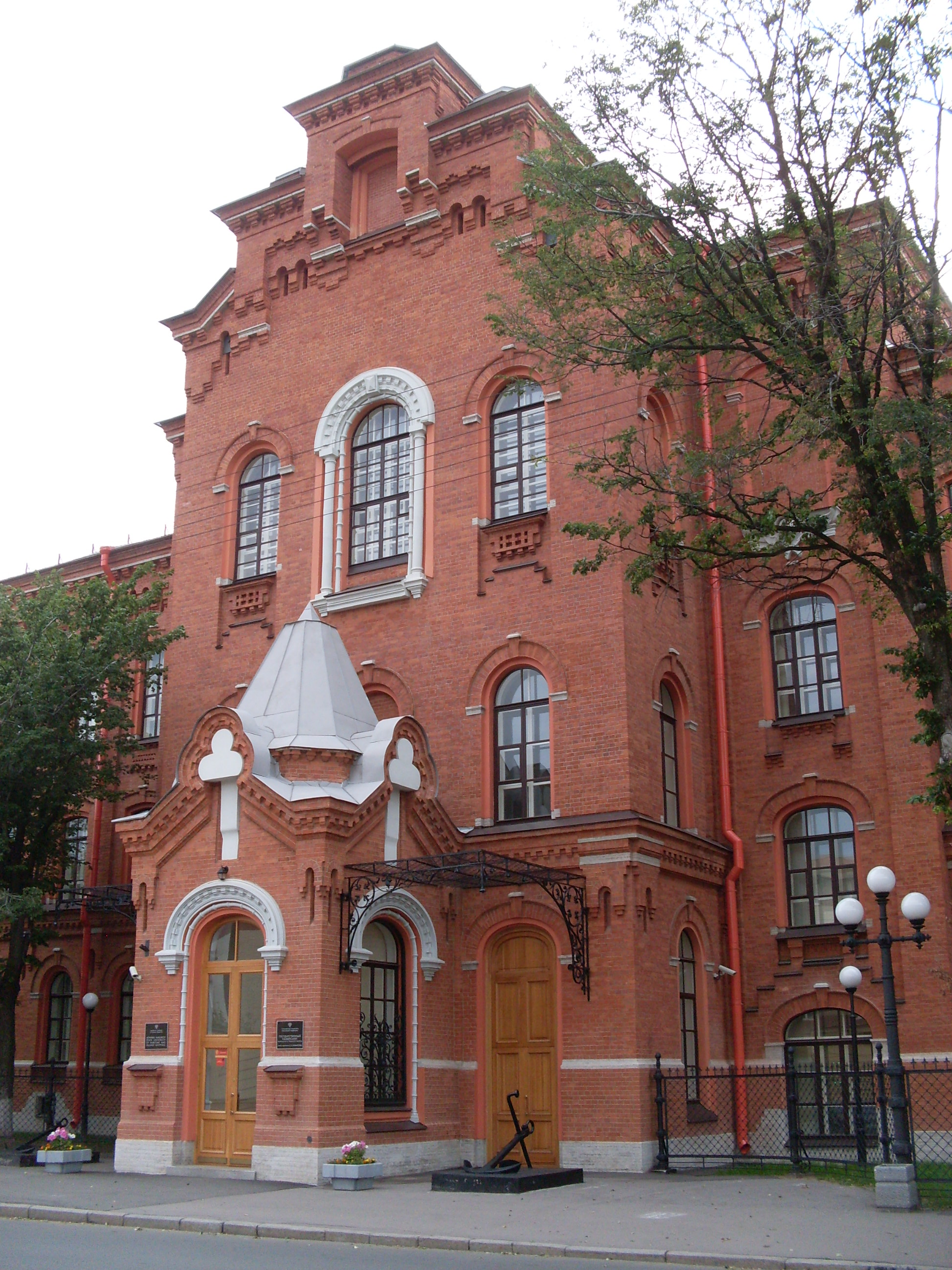 Дом призрения (Санкт-Петербург и Лен.область, Санкт-Петербург, Косая линия, 15-а)